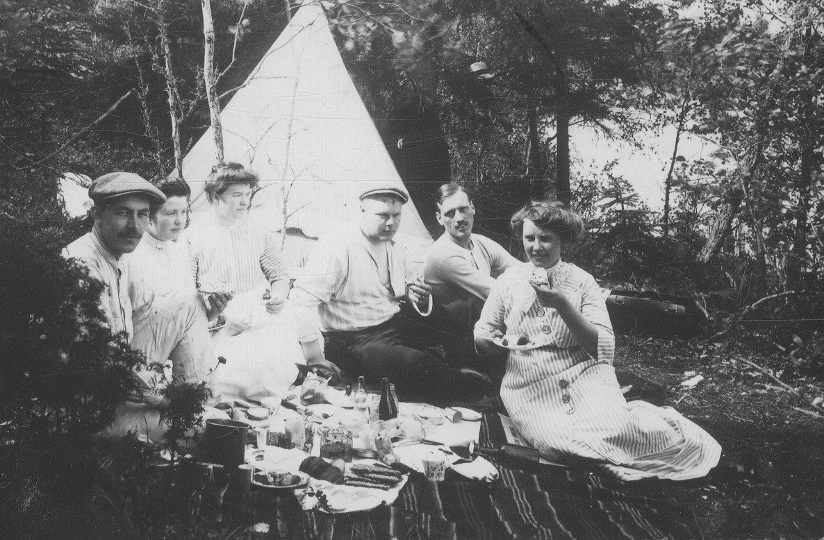 Familjen Petterson har picknick vid Källtorpssjön